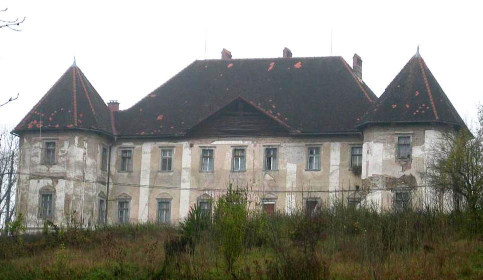 Castle Bokalce near Ljubljana, Slovenia. by: Ziga.